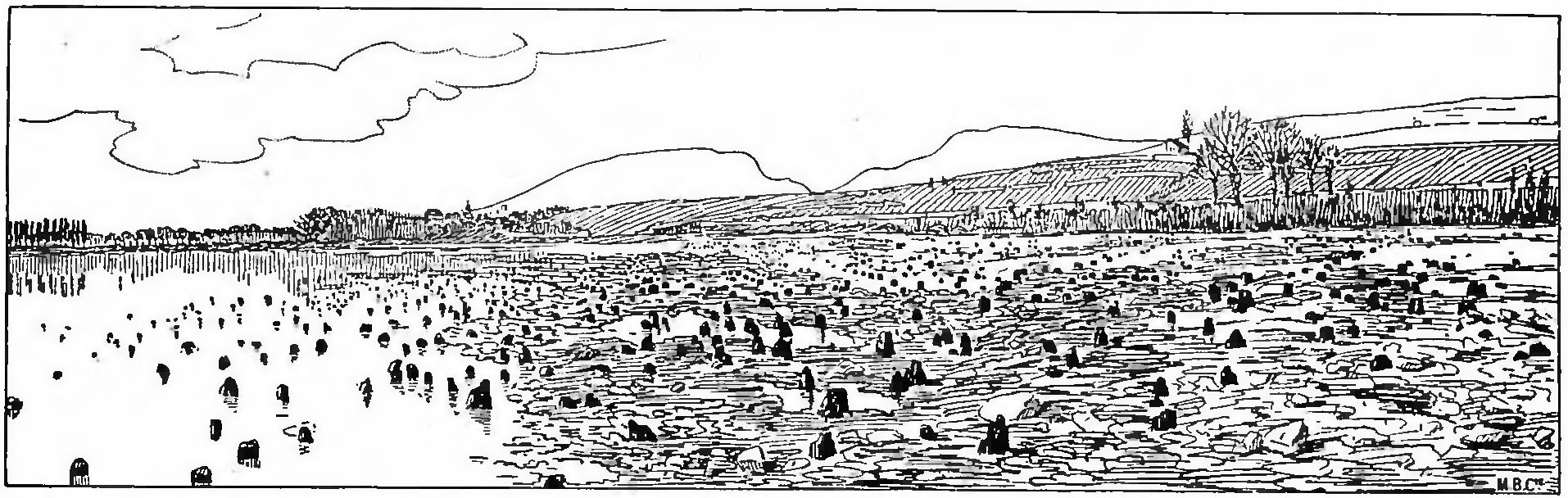 Fig 2. — Plage d’Auvernier. Pilotis de l’ancien village lacustre.